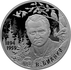 Монета Банка России, писатель В.В. Бианки, к 125-летию со дня рождения (11.02.1894). 2 рубля, серебро, реверс, пруф. Рельефный портрет В.В. Бианки, надпись: «В. Бианки». Чеканка — Санкт-Петербургский монетный двор. Художник: С.А. Козлов. Скульптор: А.А. Долгополова.